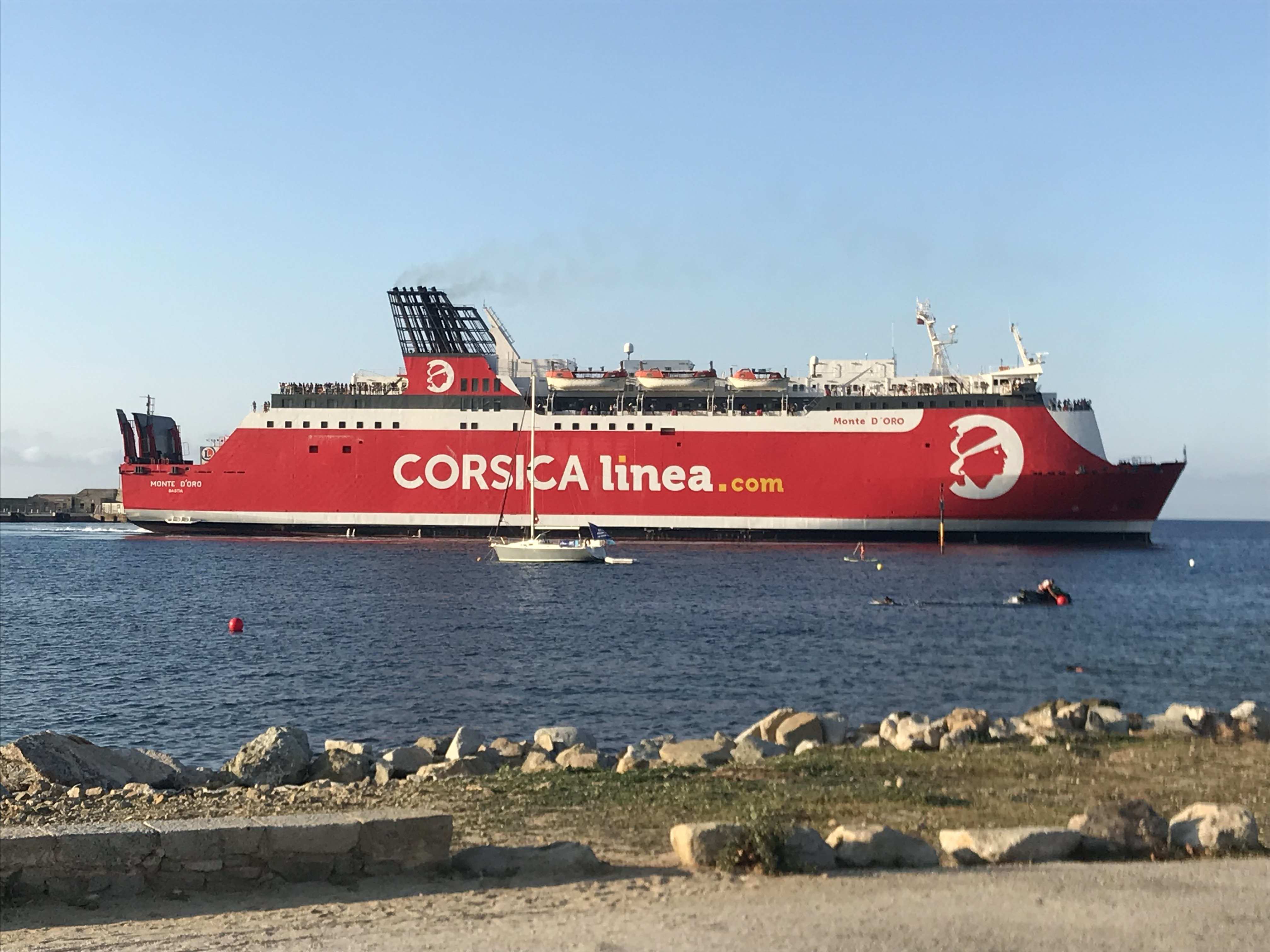 Le Monte D'ORO à quai au port de Ile Rousse